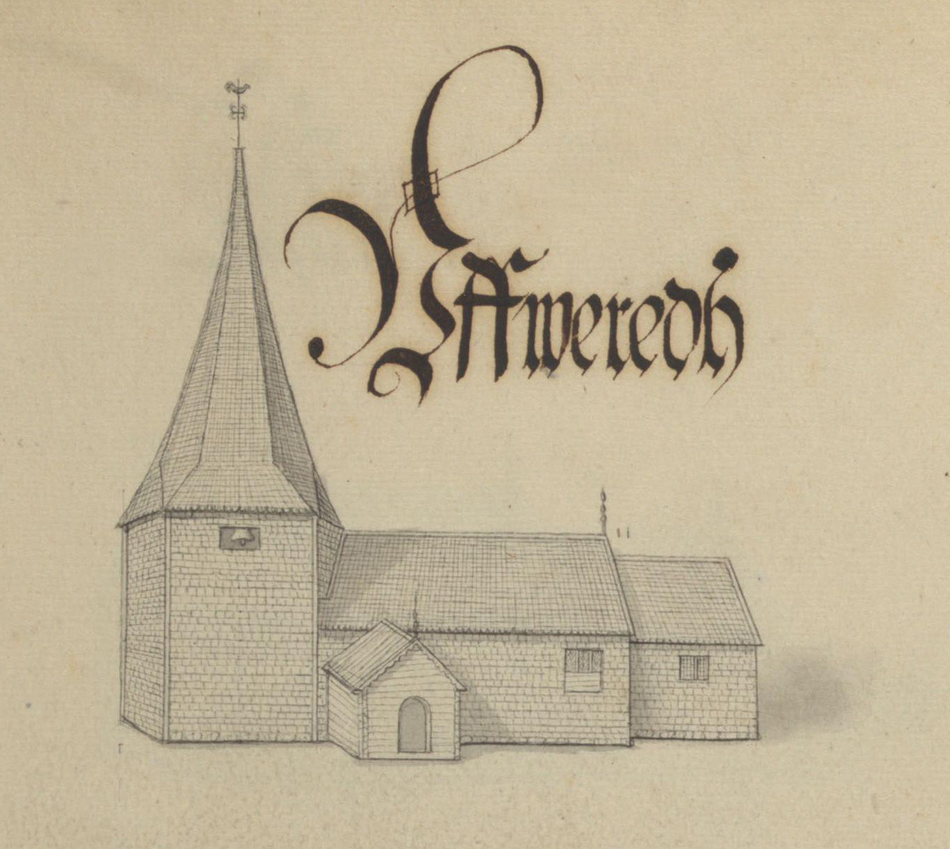 Uvereds kyrka. Kyrka, äldre, teckning ur Peringskiölds Monumenta, avfotograferad i färg.